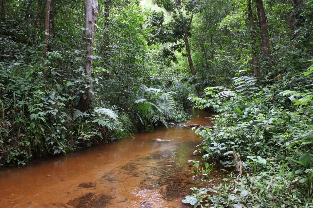 Foto tirada no Refúgio de Vida Silvestre Mata do Junco, no município de Capela, em Sergipe.